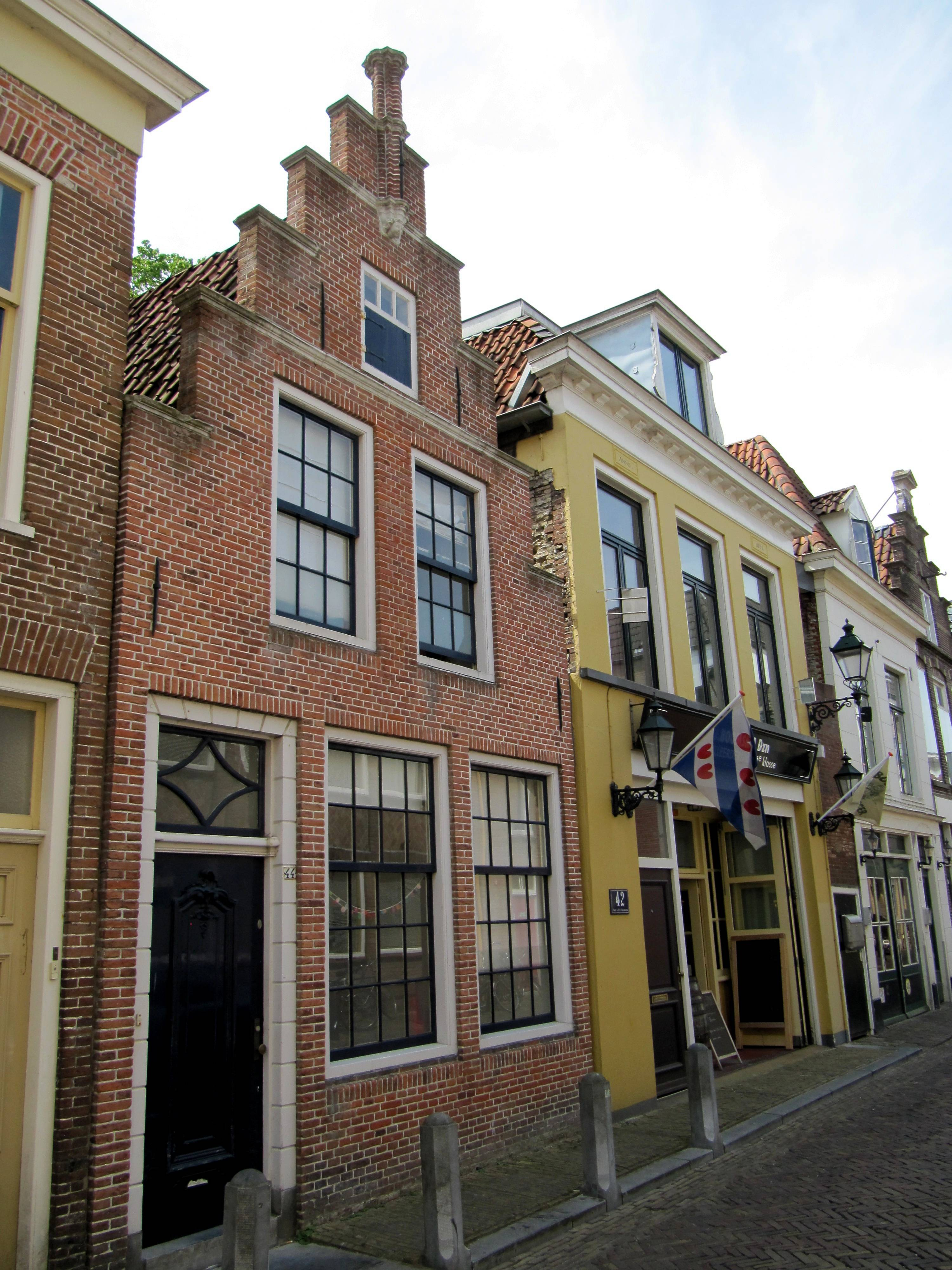 Pandje onder zadeldak tegen verzorgde trapgevel met aardig gedetailleerde toppilaster op kopje; deur XVIIIc in geblokt kozijn. Zesruitsvensters